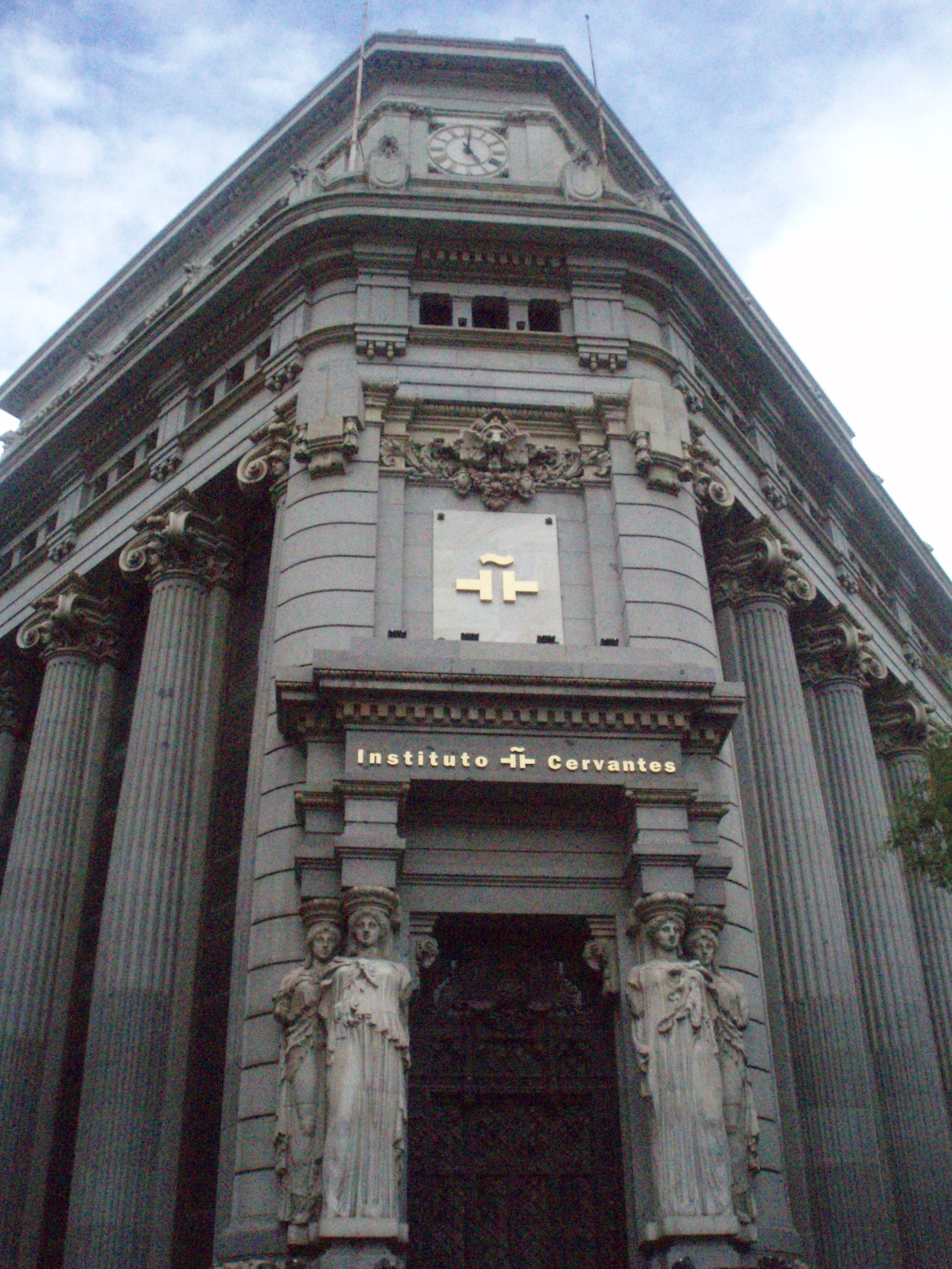 Nueva sede del Instituto Cervantes de Madrid en la calle Alcalá, cerca de la plaza Cibeles.